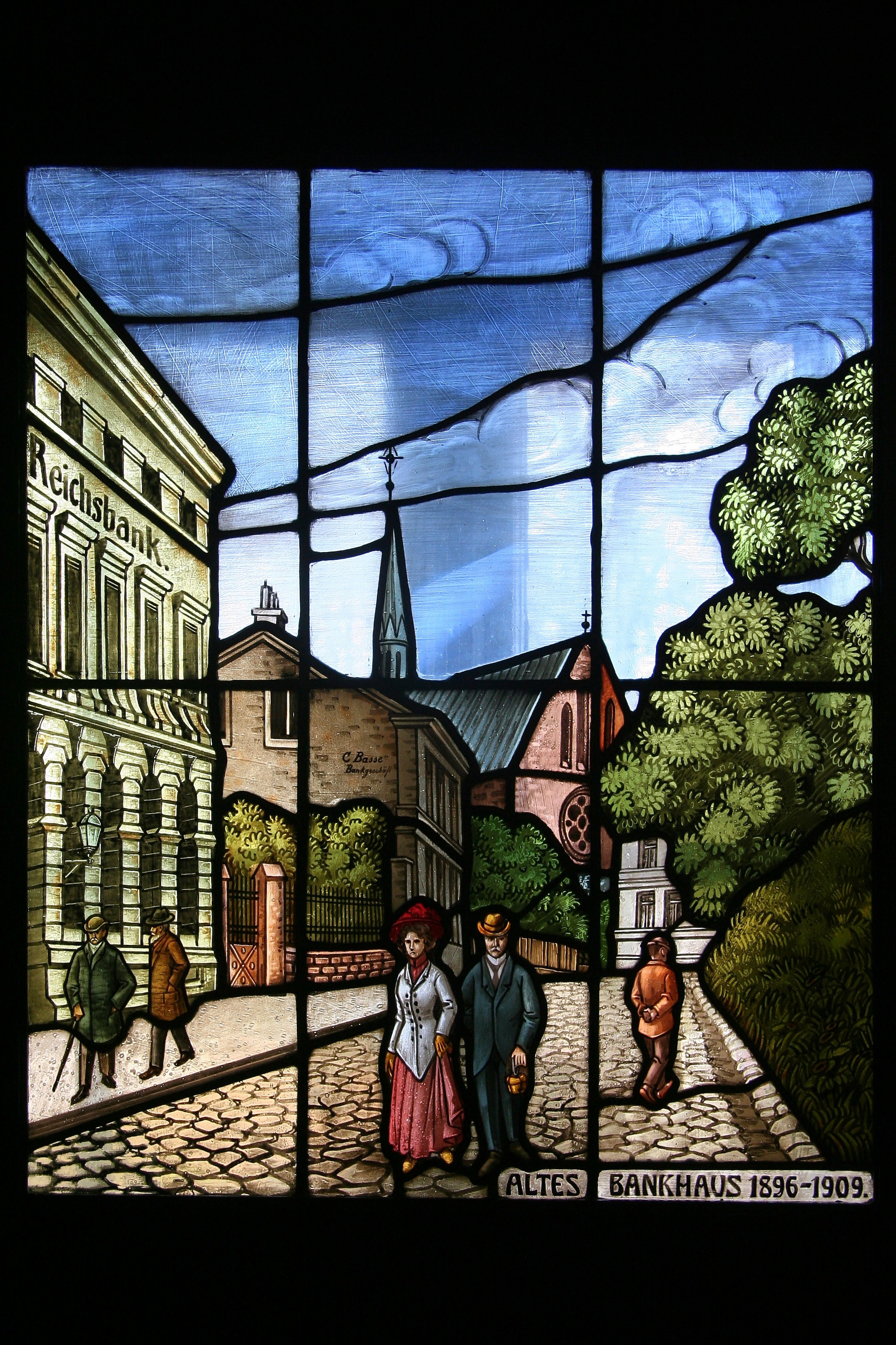 Glasbild im Geschichtsmuseum Lüdenscheid